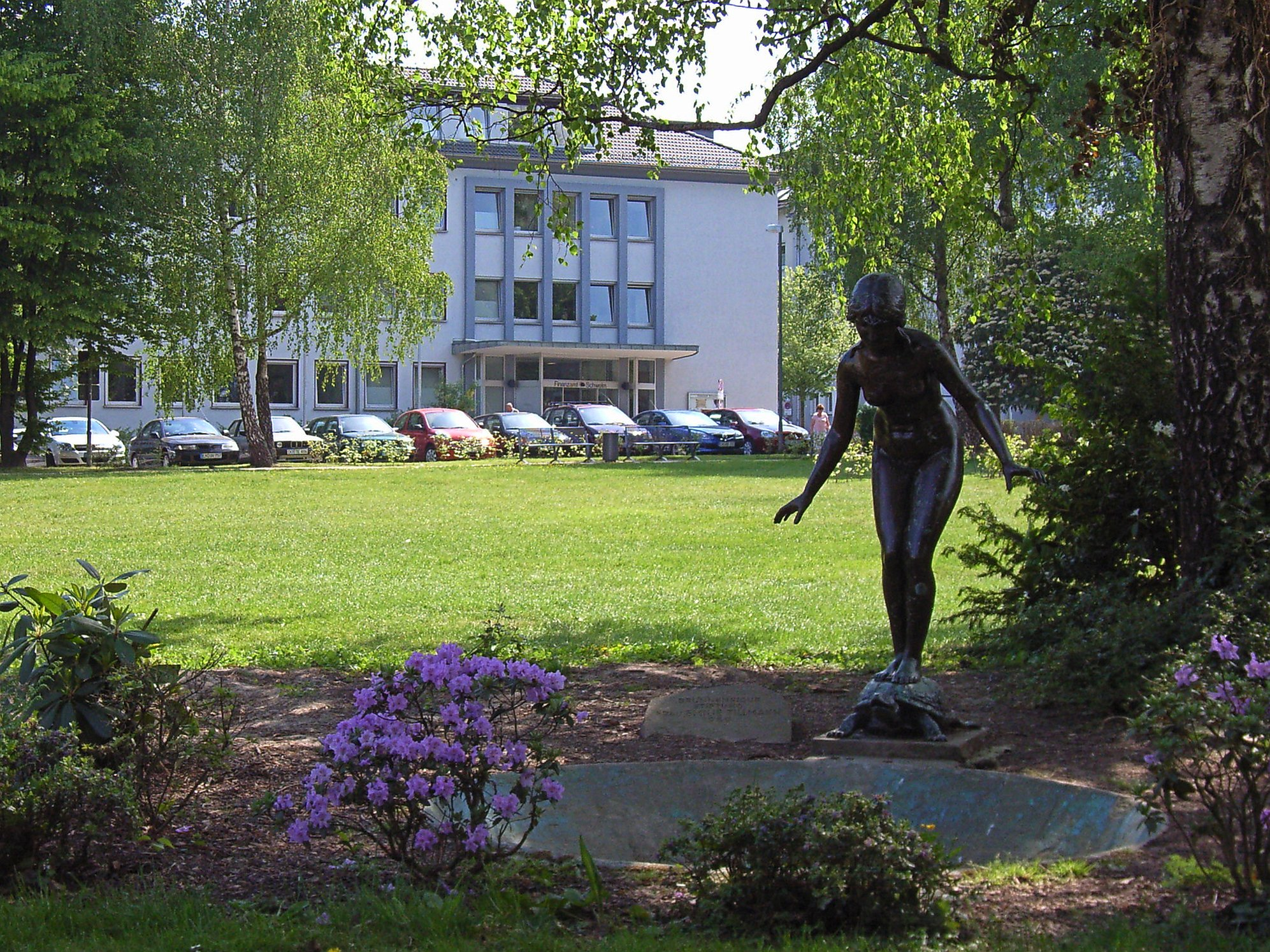 Park am Bahnhof in Schwelm (NRW, Deutschland) mit Finanzamt im Hintergrund